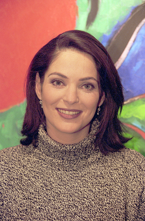 Judith de Klijn